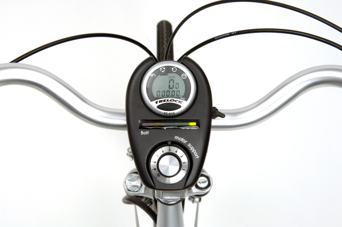 Antec Remo Cockpit